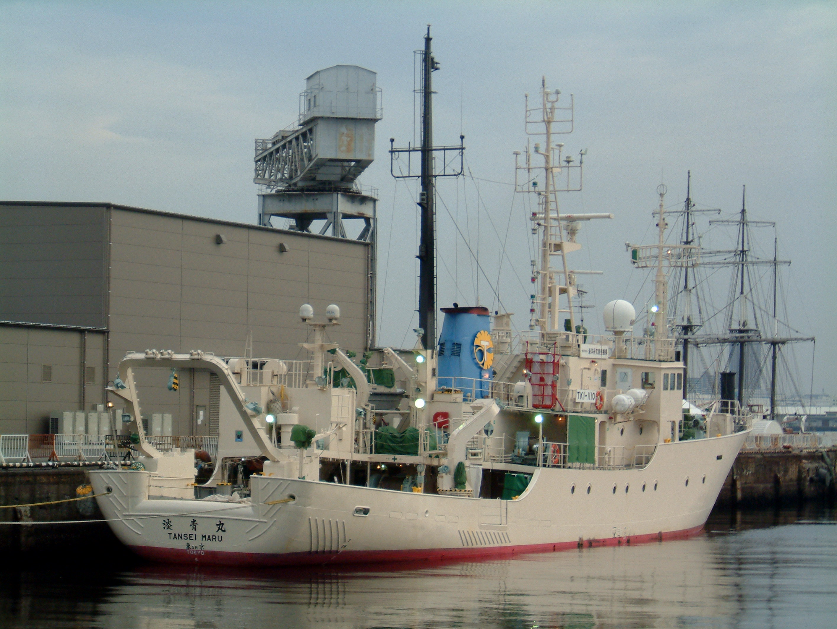 海洋研究開発機構（JAMSTEC）の海洋調査船淡青丸（たんせいまる）、横浜市中区の新港ふ頭で撮影